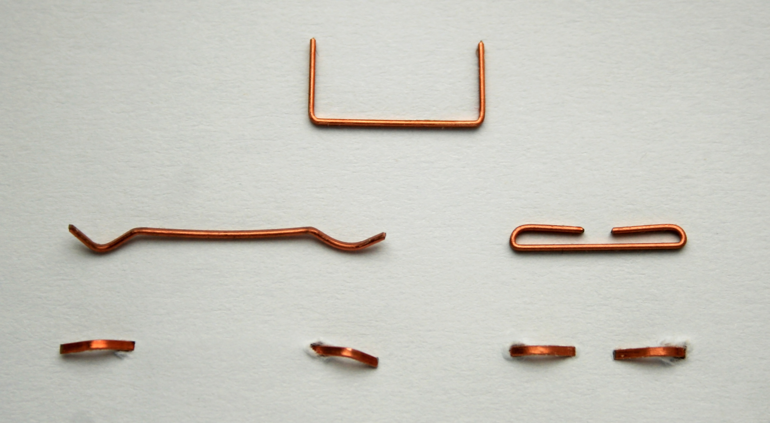 Heftklammern der Größe 24/6. Offene (links) und geschlossene (rechts) Heftung